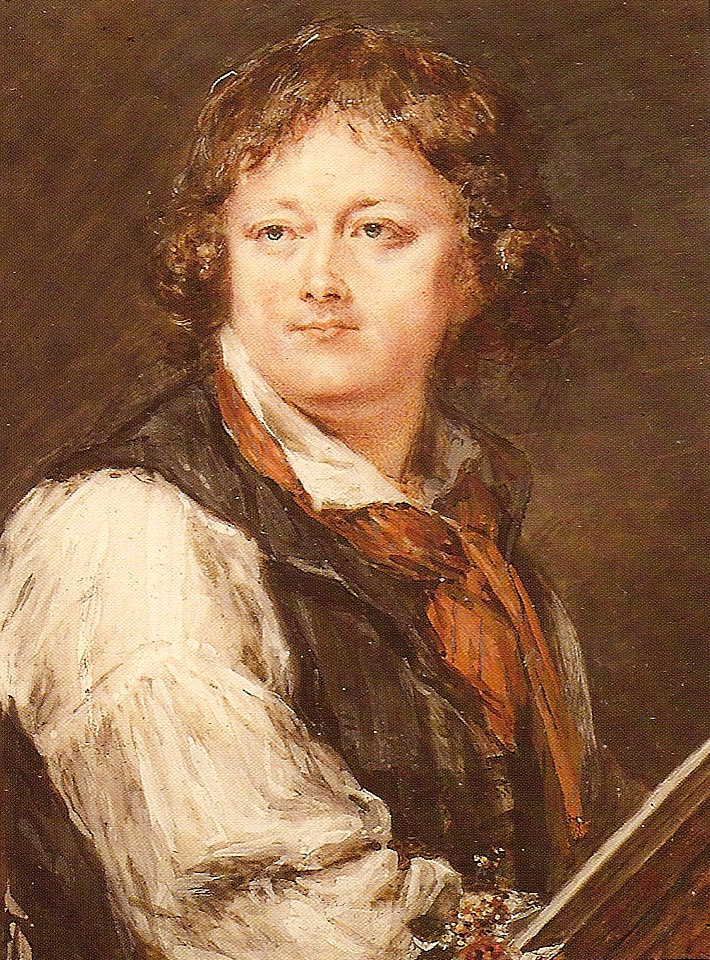 Peter Adolf Halls självporträtt, olja, beskuret. (Nationalmuseum). En snarlik miniatyr finns i Louvrens samlingar. Posen är densamma men klädseln en annan och den är mer utarbetad.